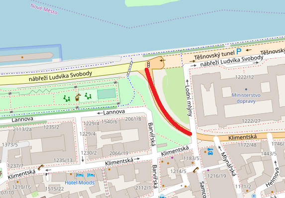 Pražská ulice Holbova na mapě.